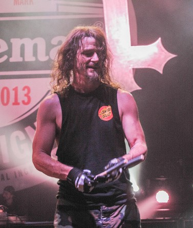 Paul Bostaph - New York - 2013 - Slayer